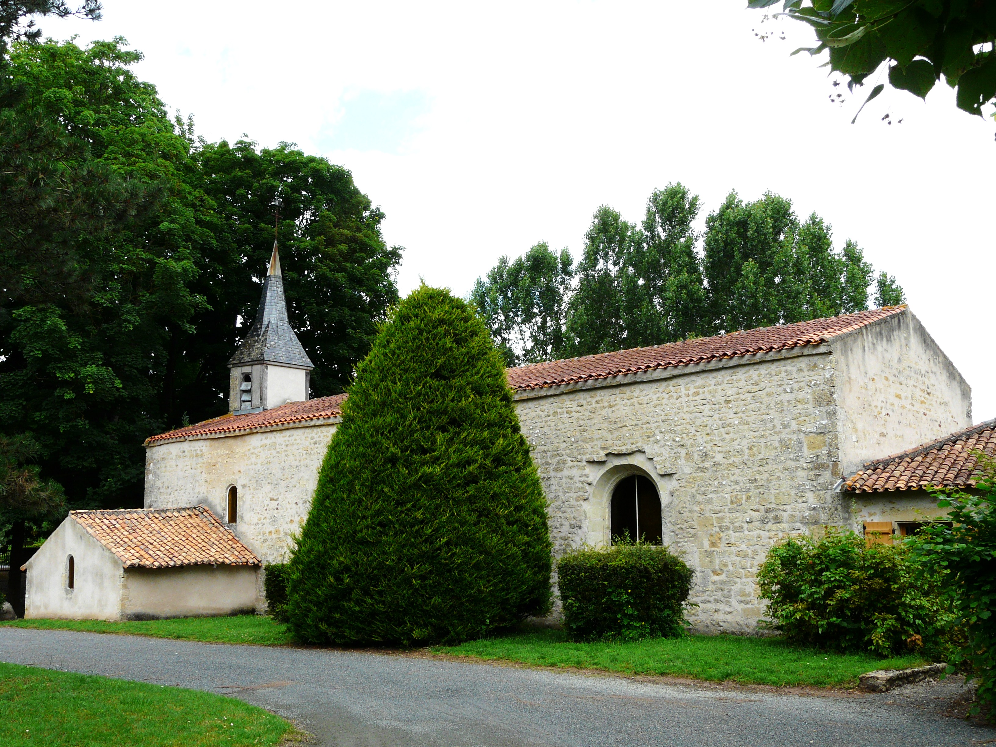 L'église d'Availles-Thouarsais